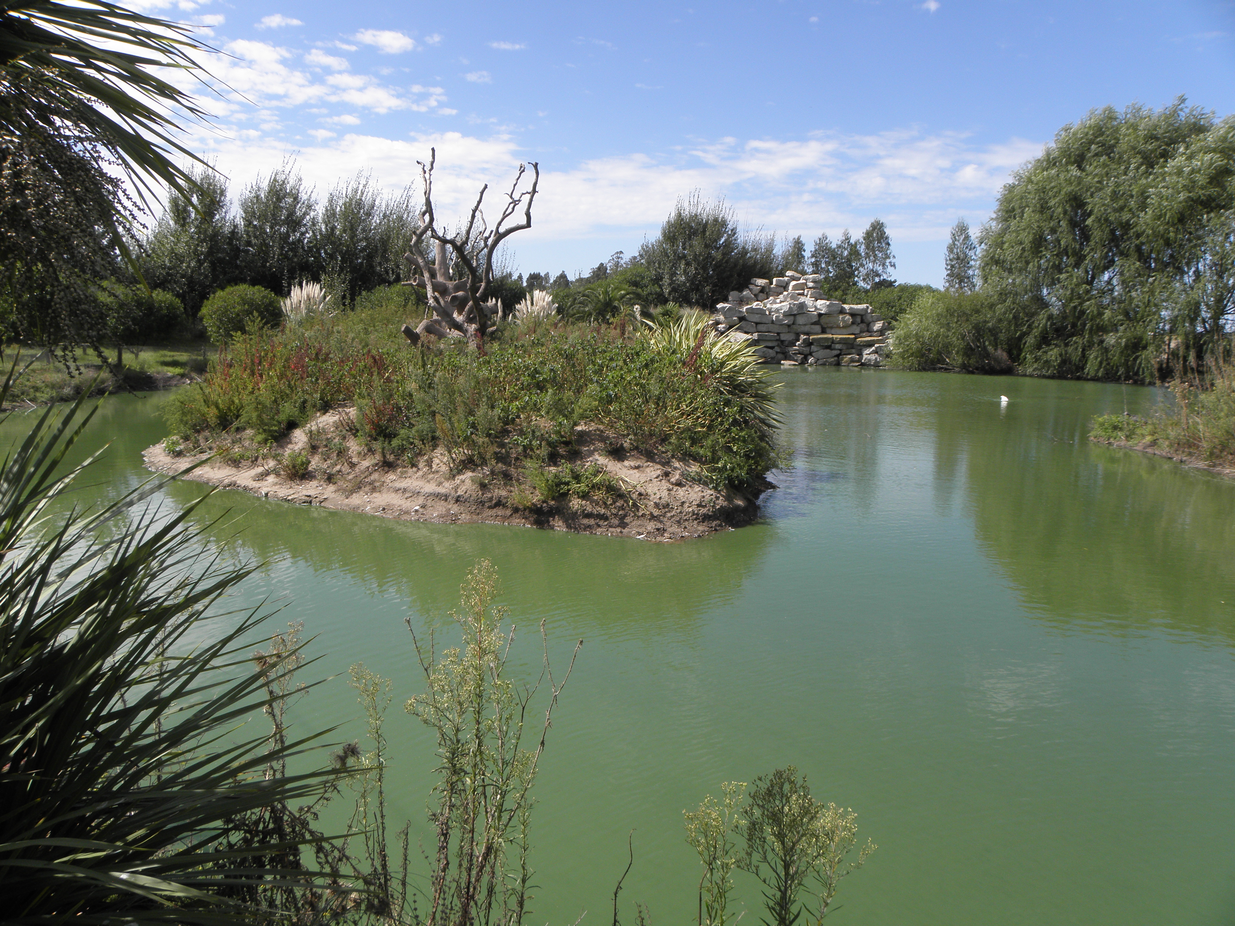 Zoológico de Batán, provincia de Buenos Aires, Argentina.